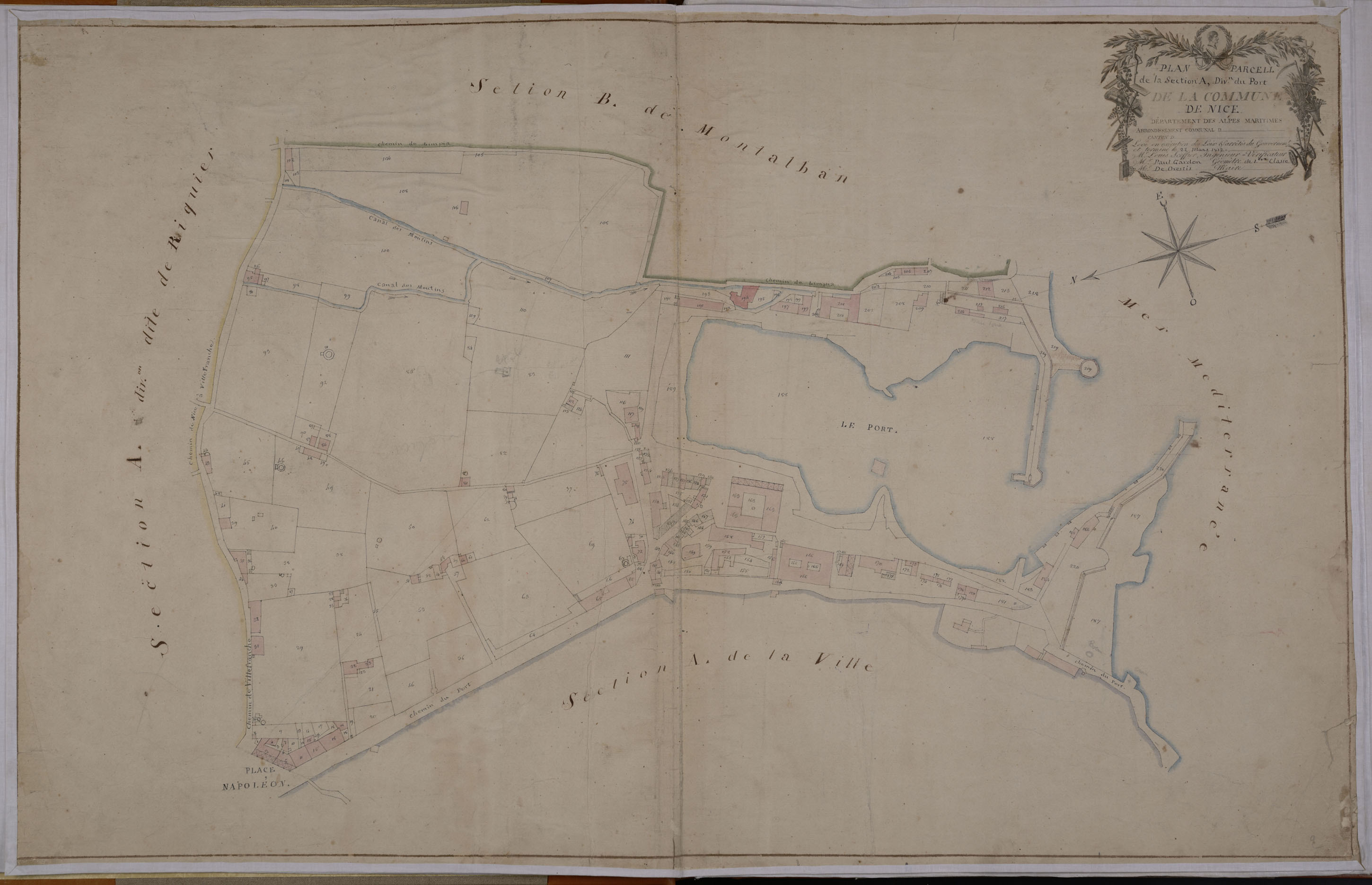 Cadastre-map from 1812, Nice, France